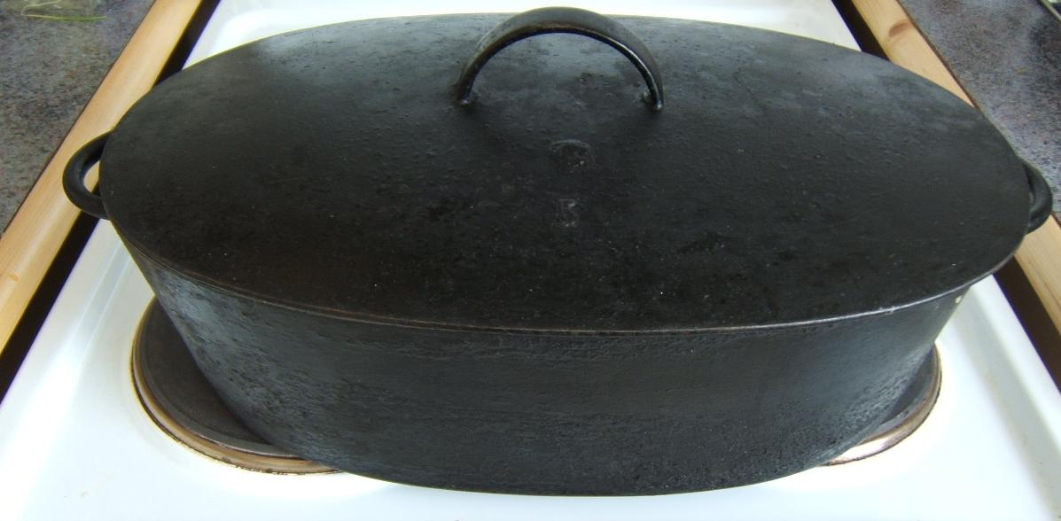 Bräter aus Gusseisen, etwa von Anfang bis Mitte des 20. Jahrhunderts